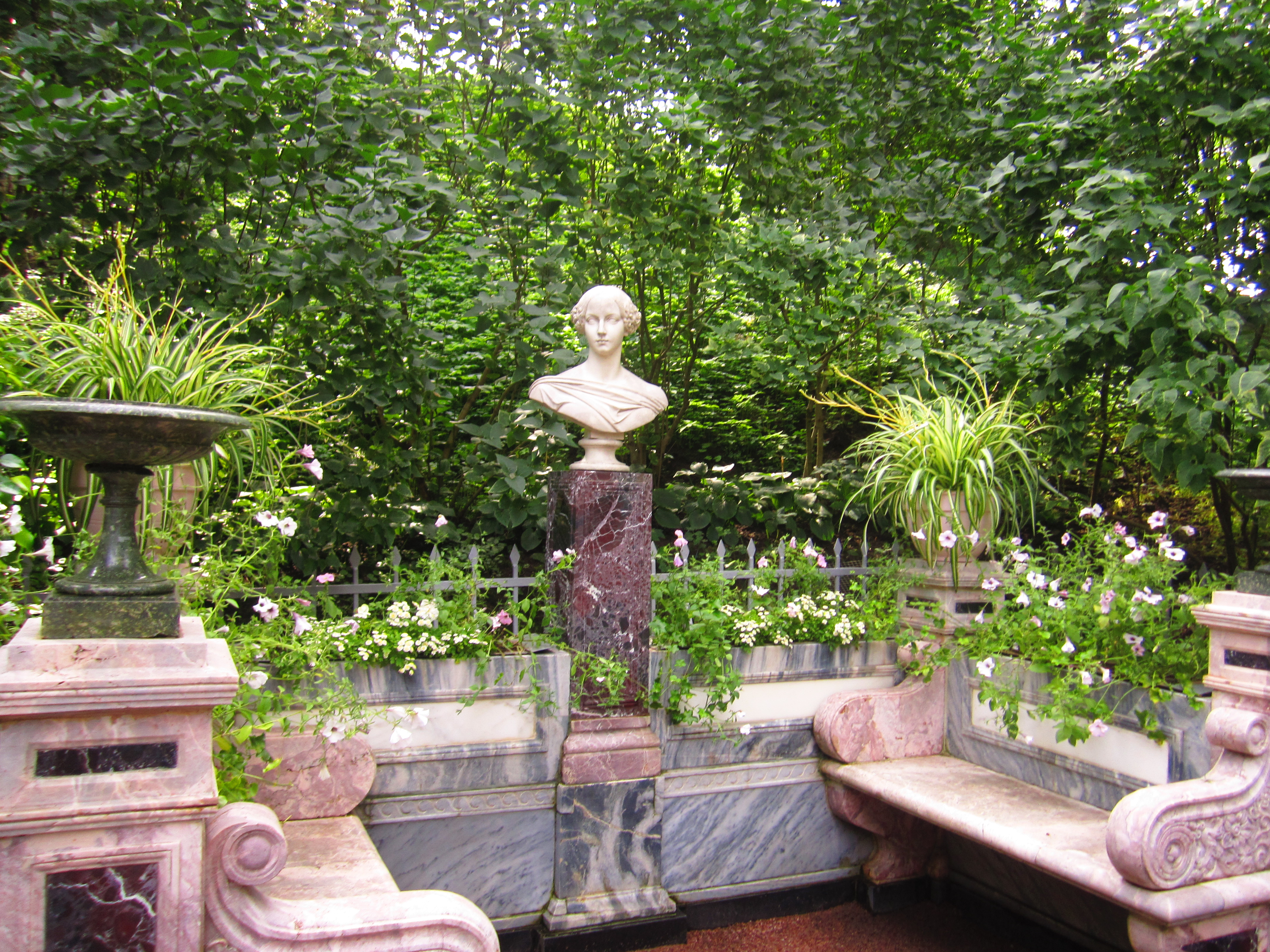 Санкт-Петербург, Петергоф